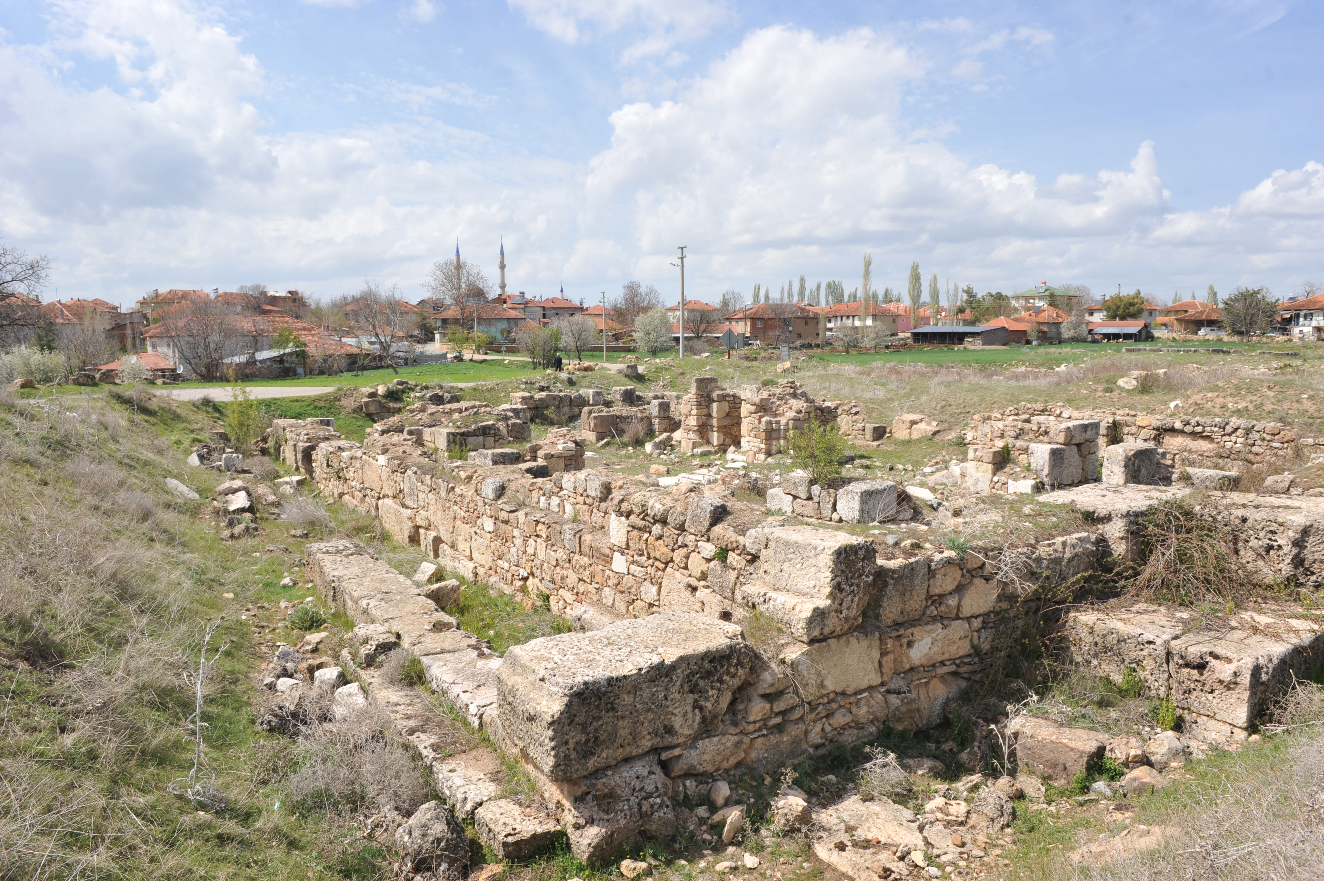 Antike Ruinen von Sebaste in Selcikler (Usak)